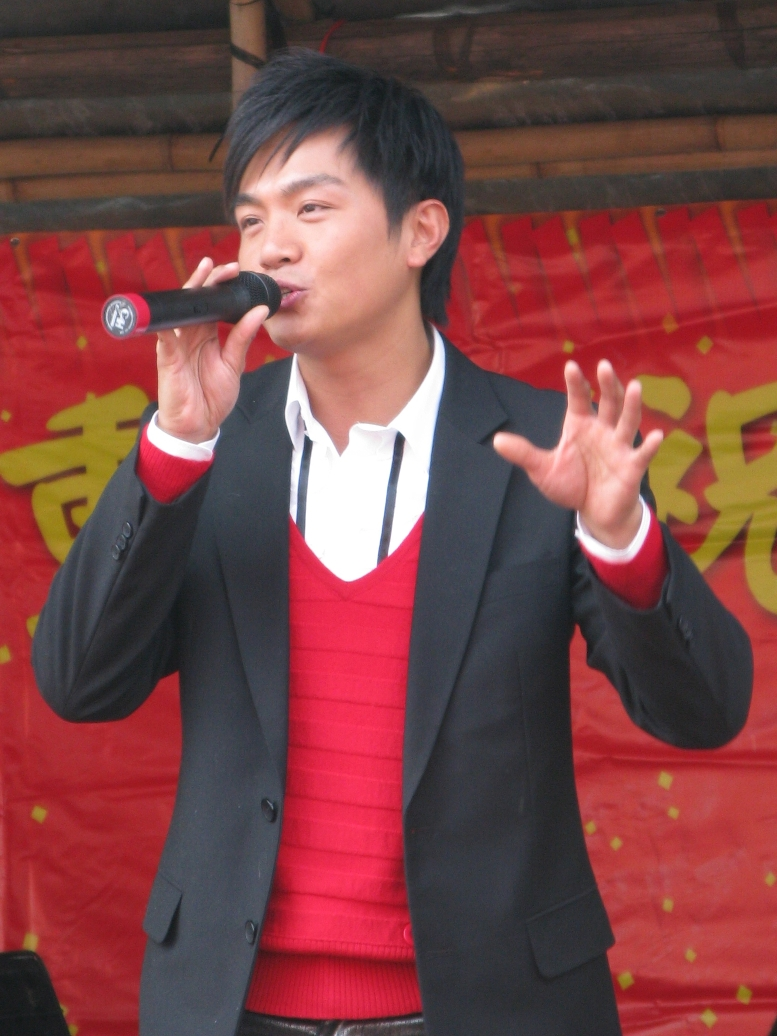 Jack Wu in Kam Tin